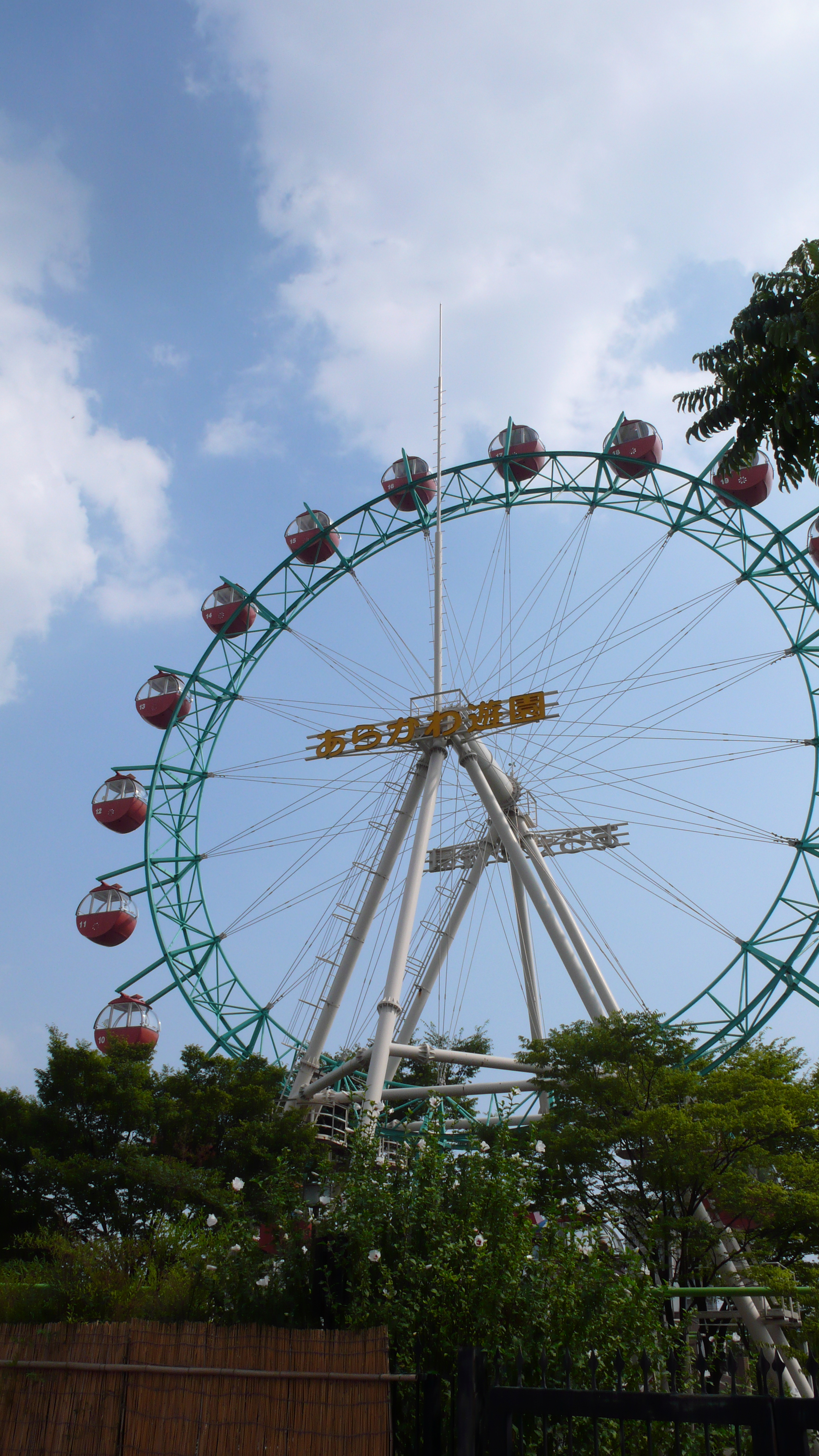 東京都荒川区の「あらかわ遊園」観覧車を撮影